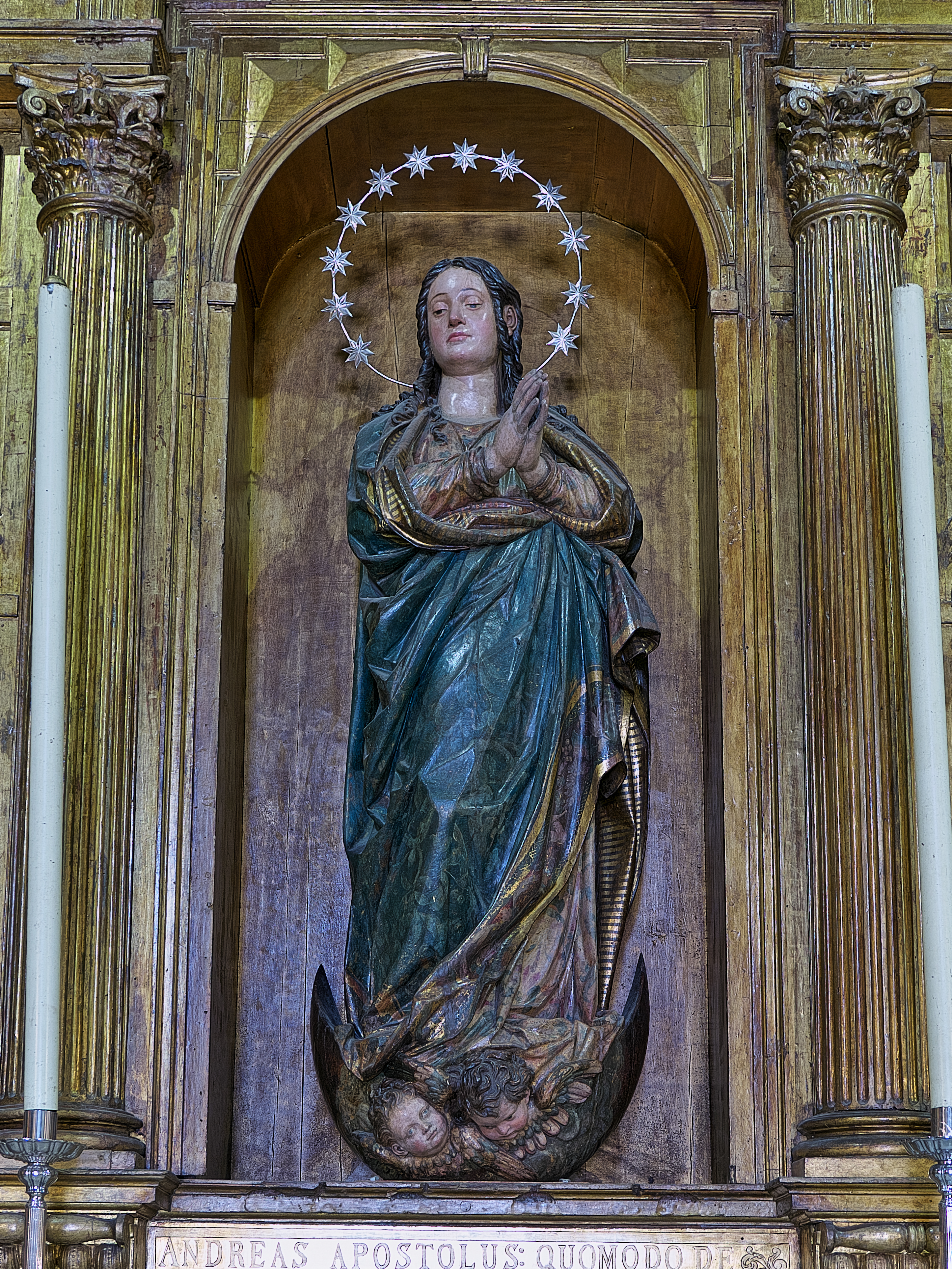 Iglesia de San Andrés (Sevilla). Modelo de Inmaculada Concepción de Gaspar Núñez Delgado, tallado por Andrés de Castillejo, autor del retablo y policromada por Alonso Vázquez (1598). Iconografía de la Inmaculada Concepción, que perfeccionó su discípulo Juan Martínez Montañés.